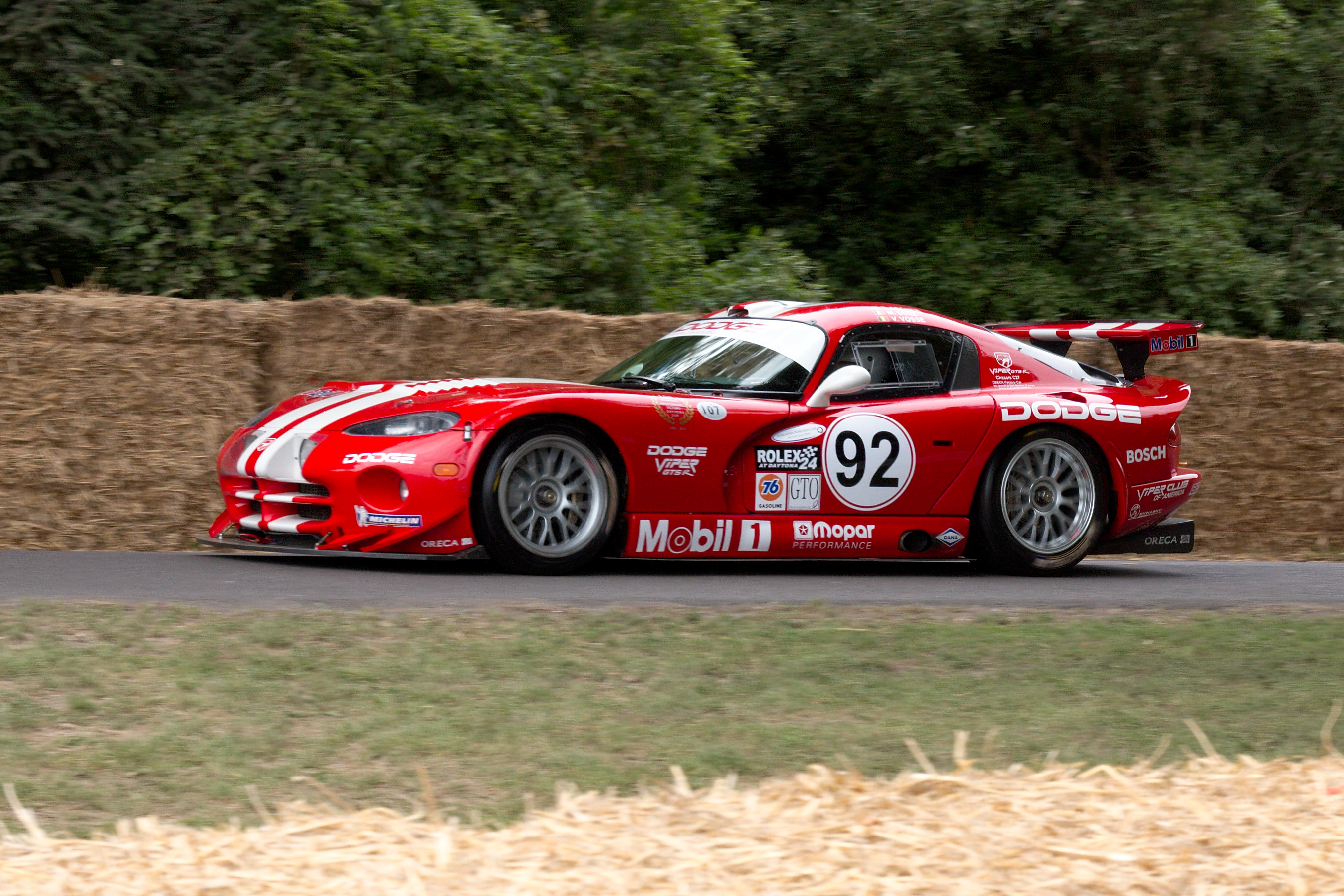 Chrysler Viper GTS-R